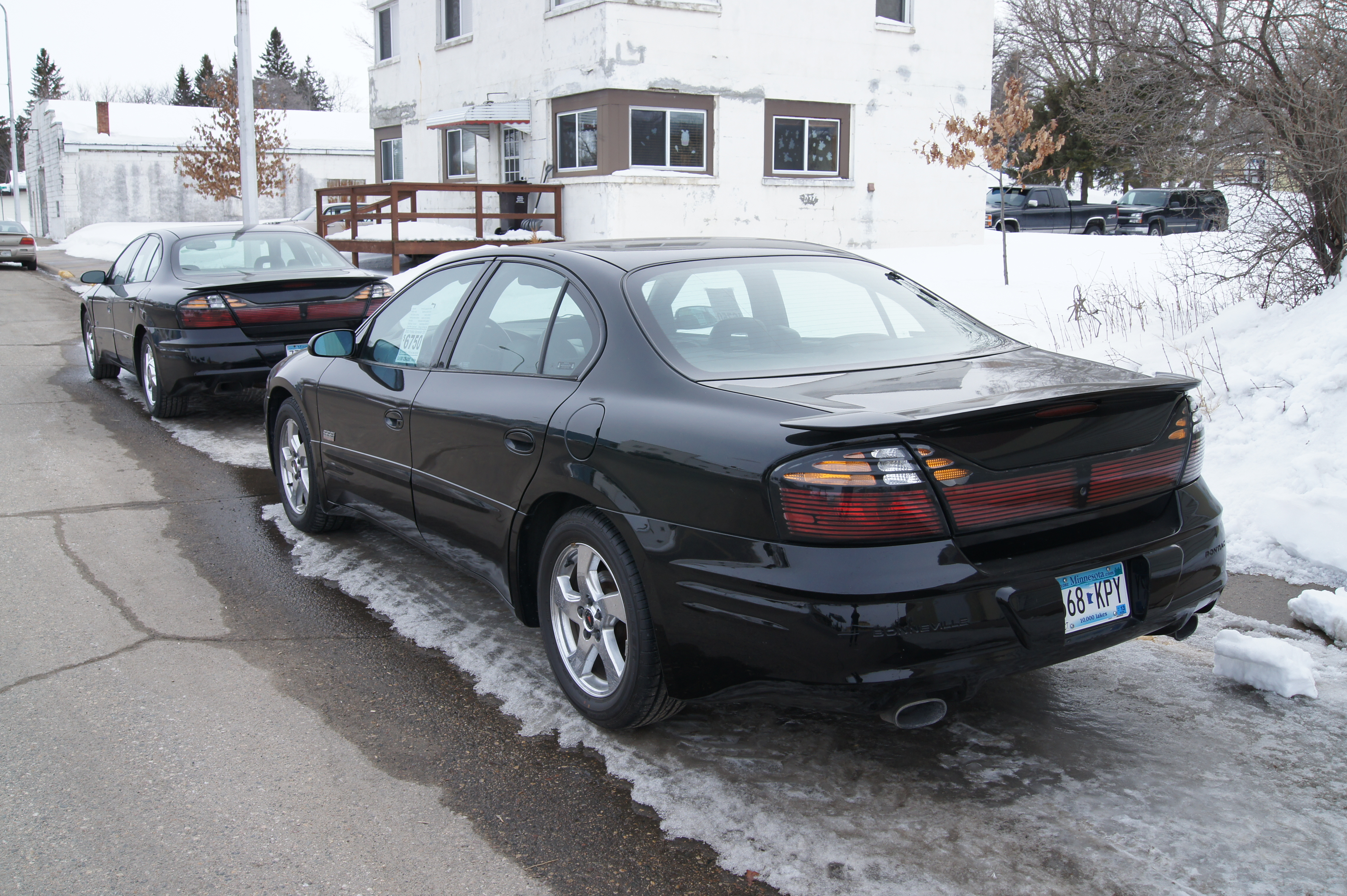 00 & 02 Pontiac Bonneville SSEi